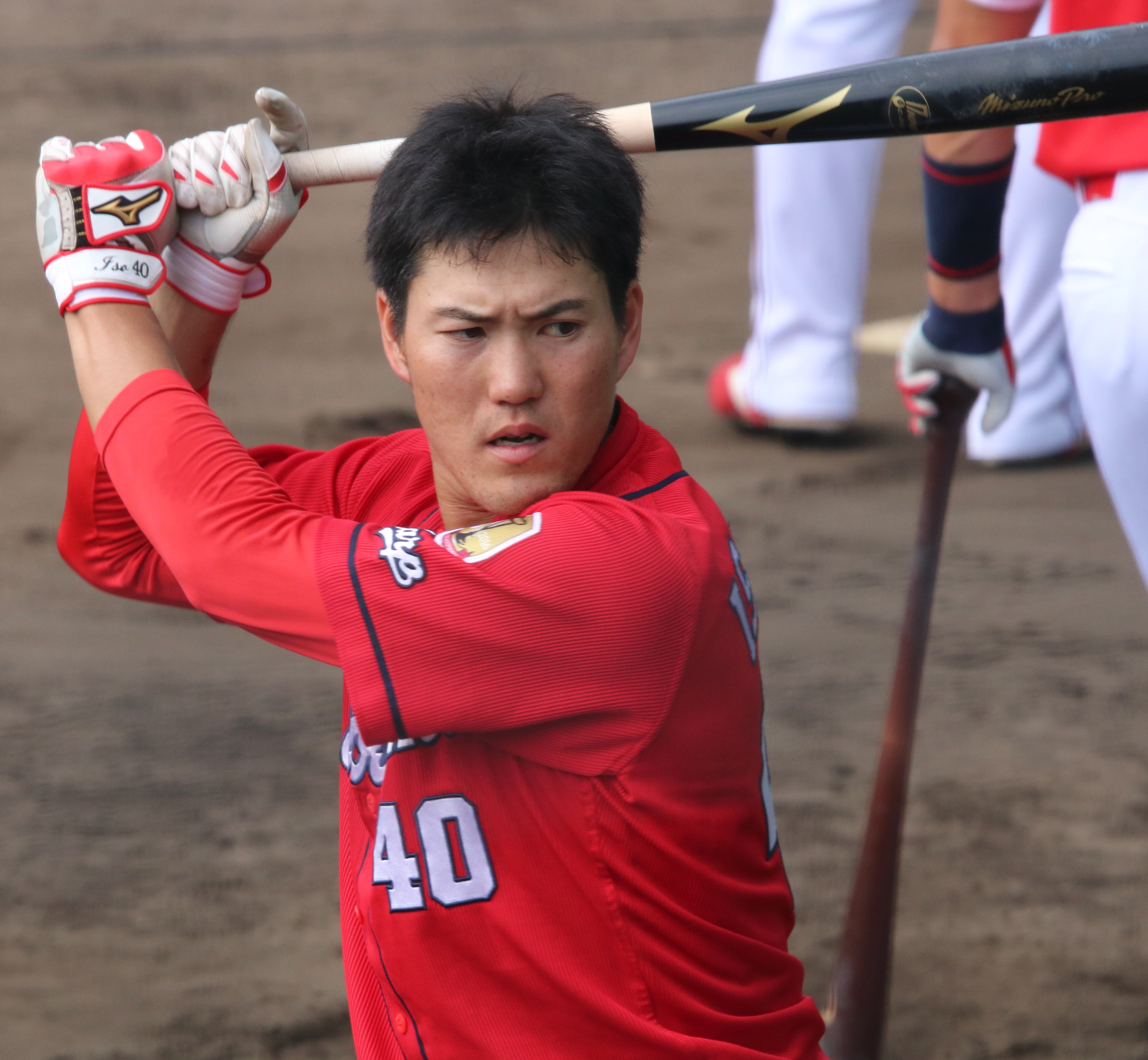 2017/11/10 天福球場